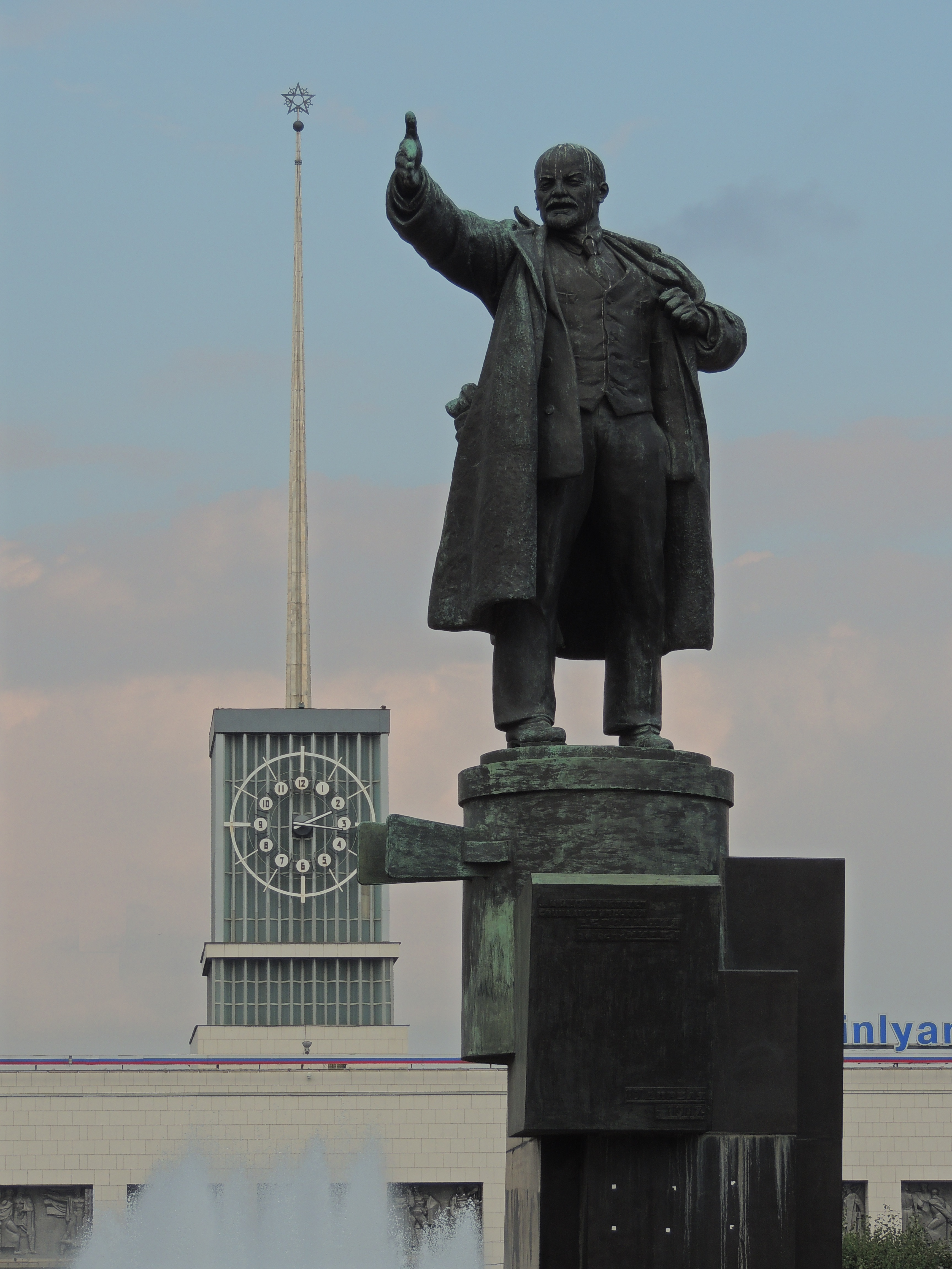 LENIN